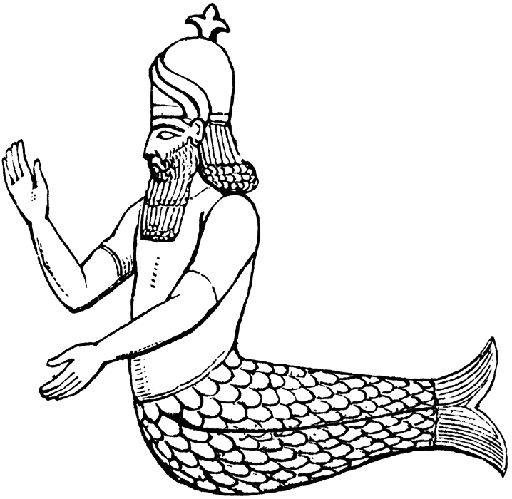 Бог Дагон